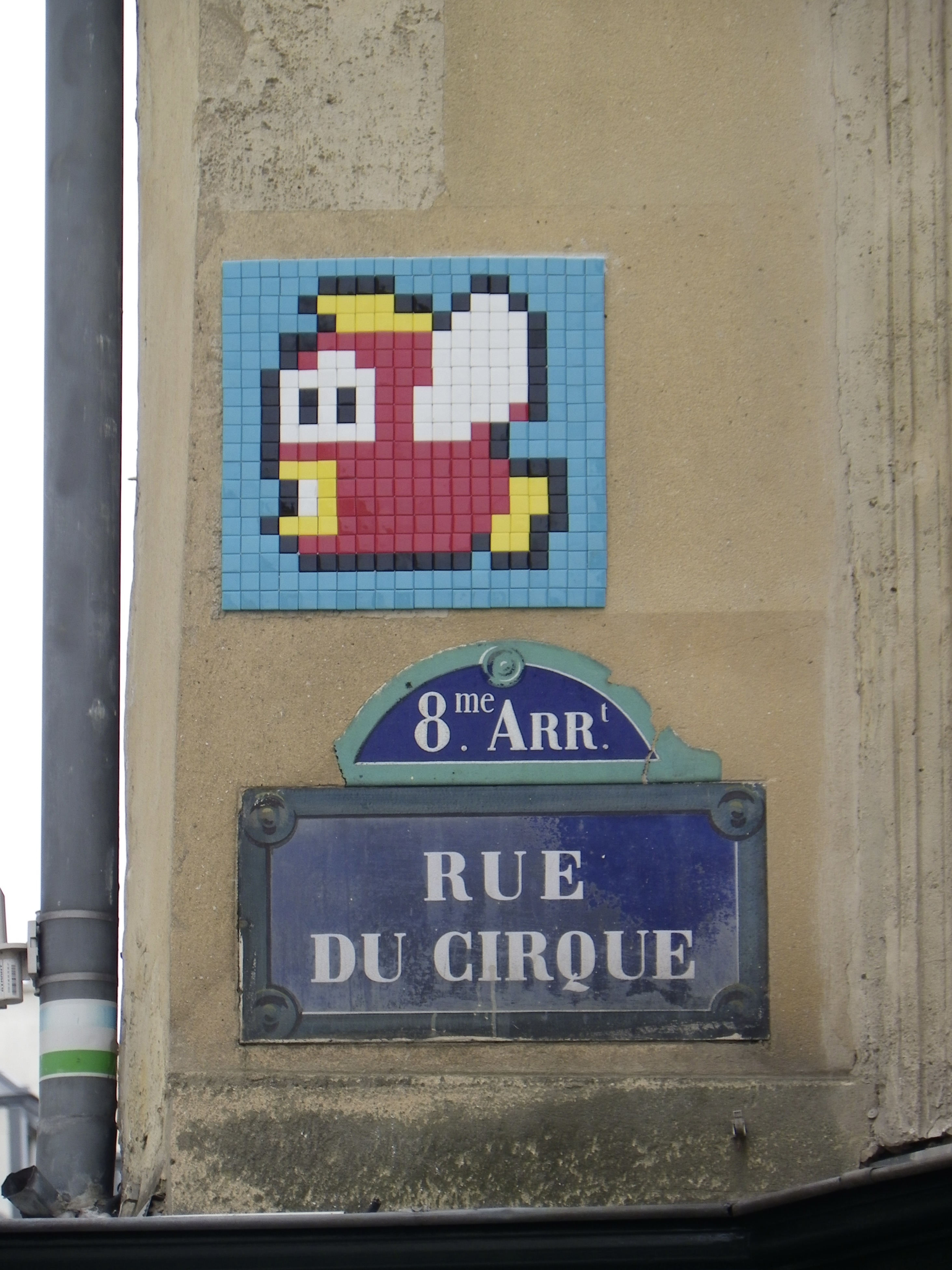 Plaque rue du Cirque à Paris